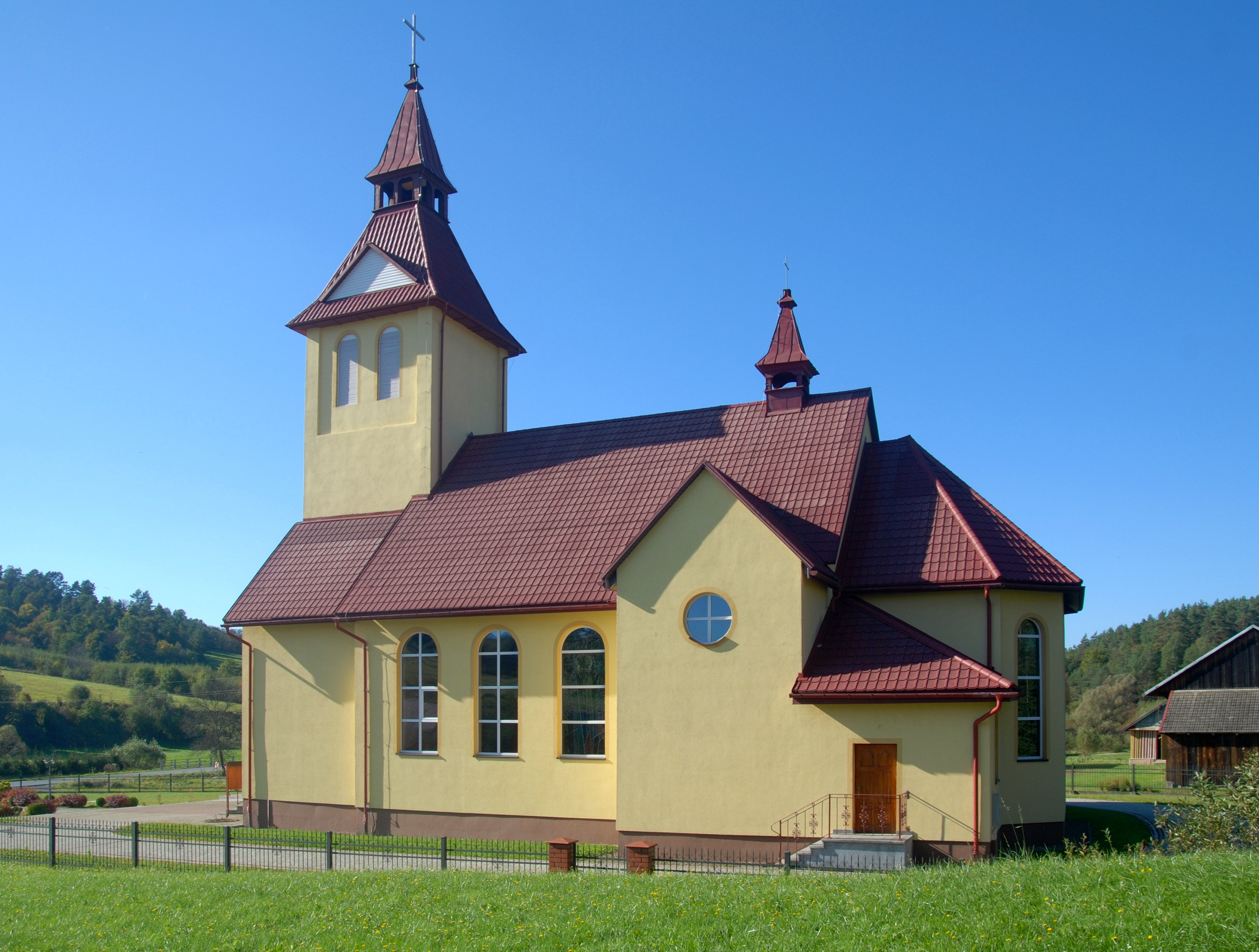 wieś Lipa (powiat przemyski)